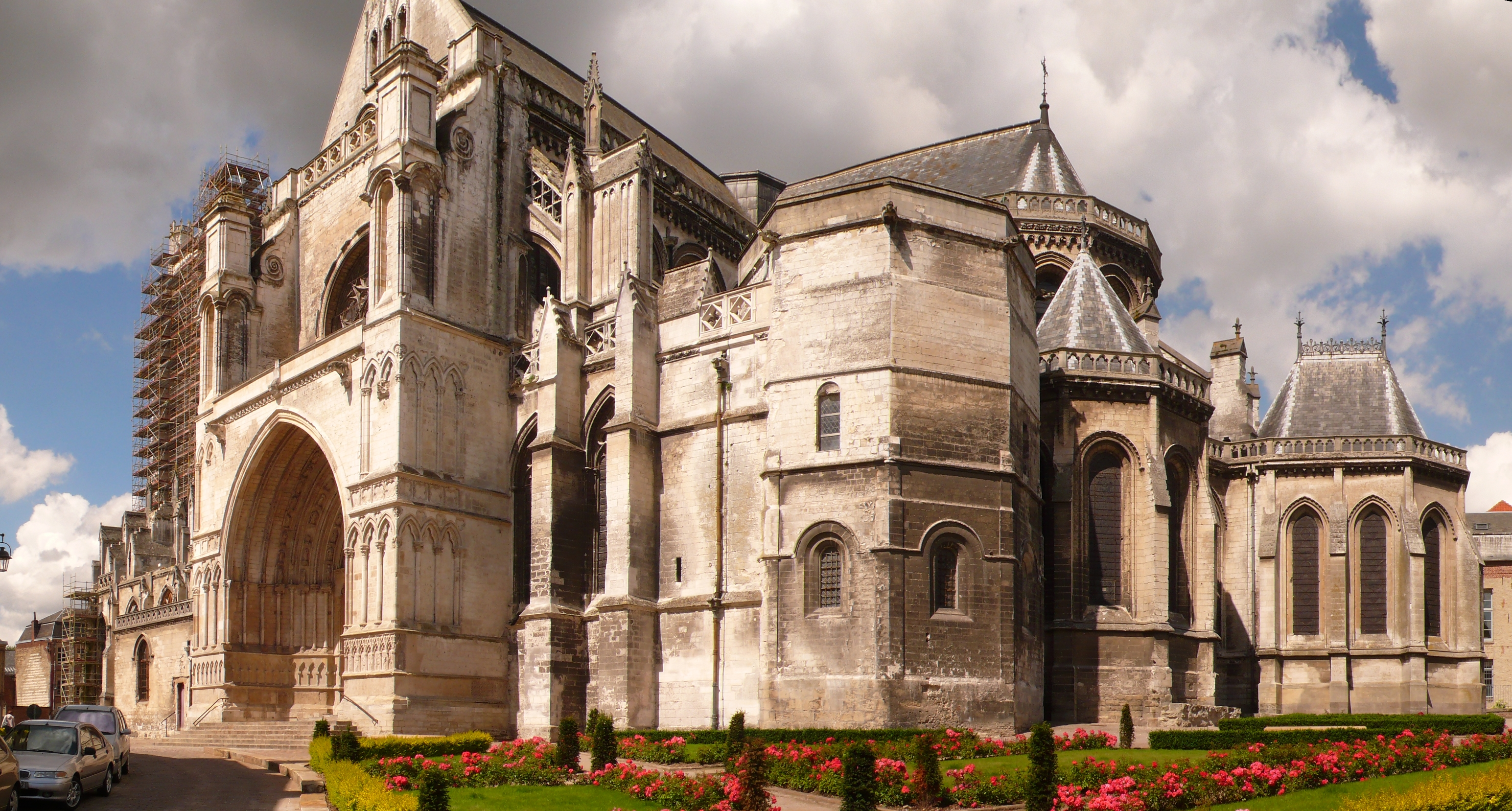 Cathédrale Notre-Dame de Saint-Omer, Frankreich; von Südosten